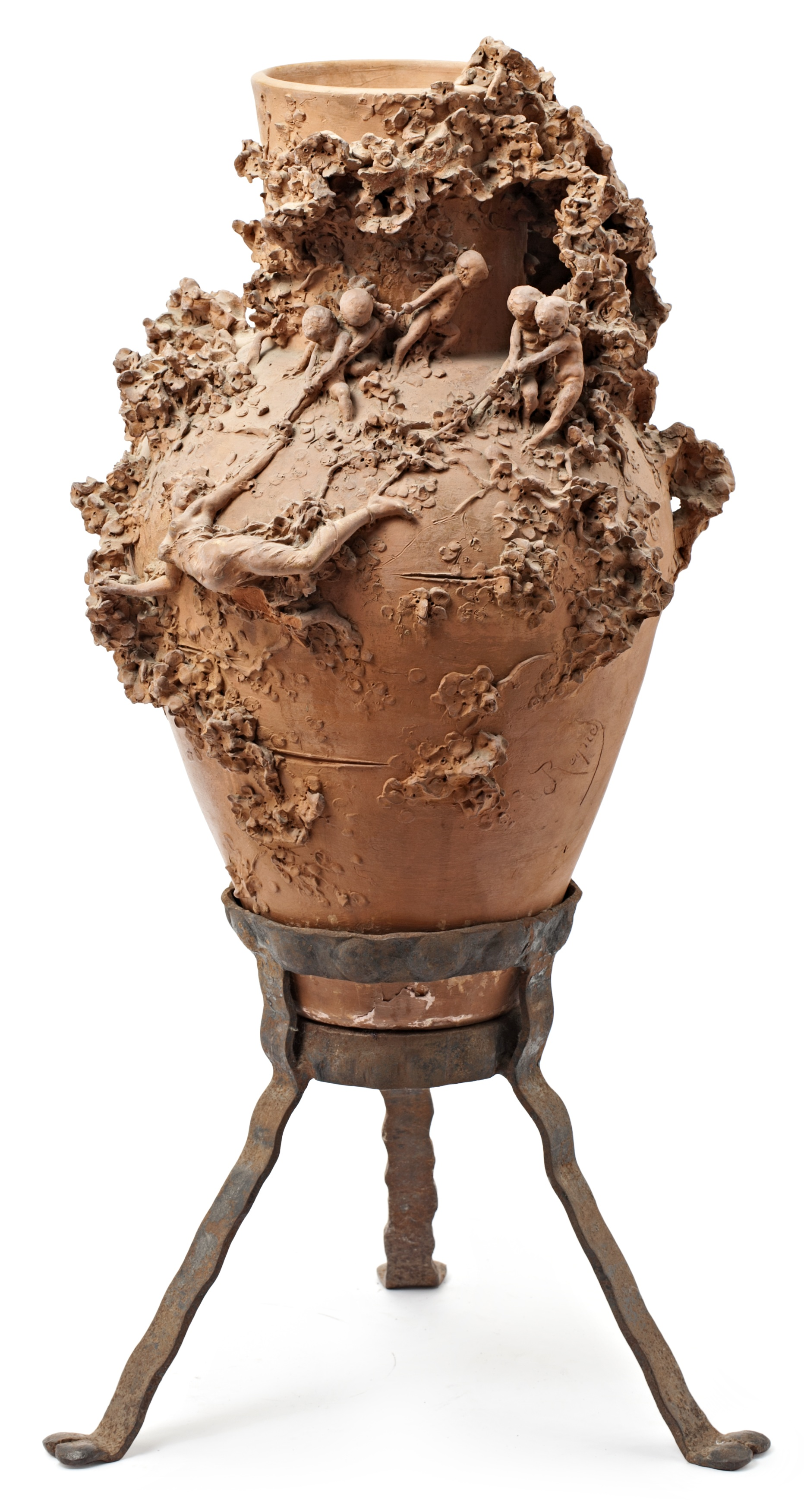 Grup escultòric en terracota, 69 cm. d'alt. Signat per Josep Reynés. Realitzat cap a 1888, es tracta d'una variant de la seva 'Gerro del somni' (Col·lecció Bagués-Masriera, Barcelona), amb disseny de Francesc Masriera, a partir de la qual la casa Masriera i Carreras va fondre un model en plata i or per a l'Exposició Universal de Barcelona de 1888. Bibliografia de referència: 'Els *Masriera', 1996, pg. 85; Pilar Vélez, 'Lluís Masriera', 2002, pg. 40; Pilar Vélez, 'Els Masriera. Un segle de joieria i orfebreria', 2004, pg. 34, 104-105.